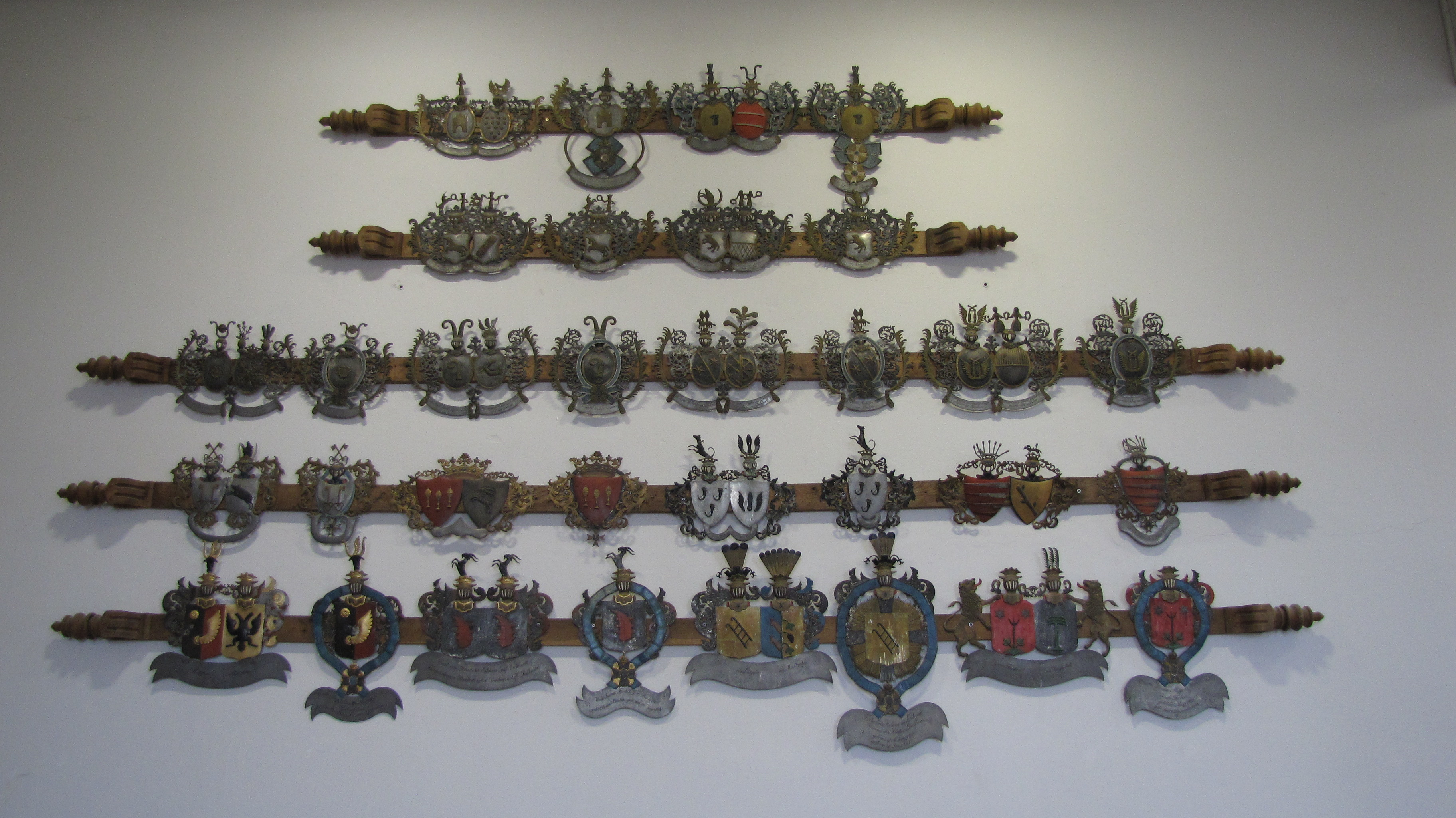 Wappen von Konventualinnen des Klosters Dobbertin; fotografiert als sie im Schloss Güstrow hingen